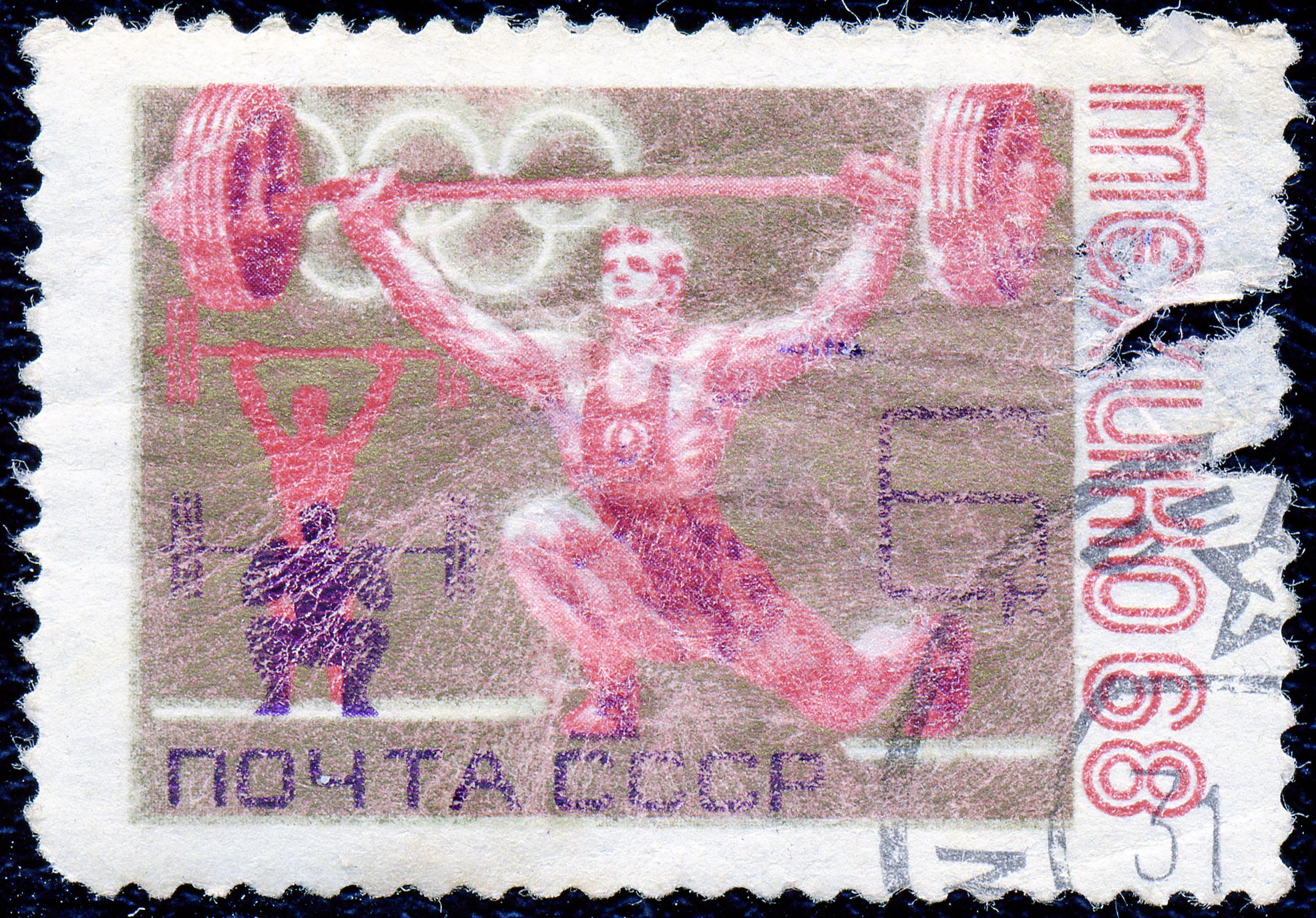 Почтовая марка СССР. 1968. XIX Летние Олимпийские игры. Тяжелая атлетика